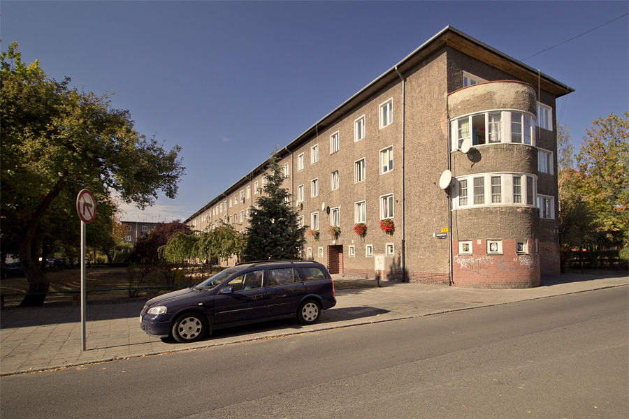 Blok przy ul. Chorzowskiej 1-17 we Wrocławiu